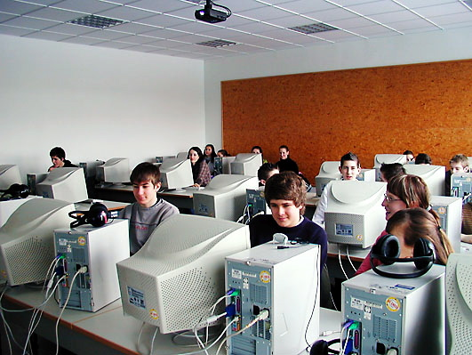 Die Freiherr-vom-Stein Schule verfügt über mehrere sehr gur ausgerüstete Computerräume, Dieter Umlauf, 2005